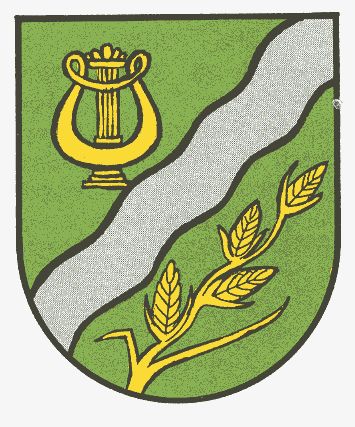 Wappen von Jettenbach (Pfalz)